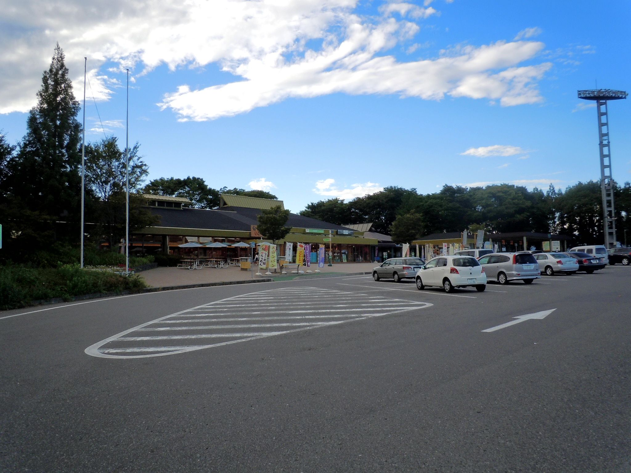 関越自動車道 赤城高原サービスエリア（下り線）